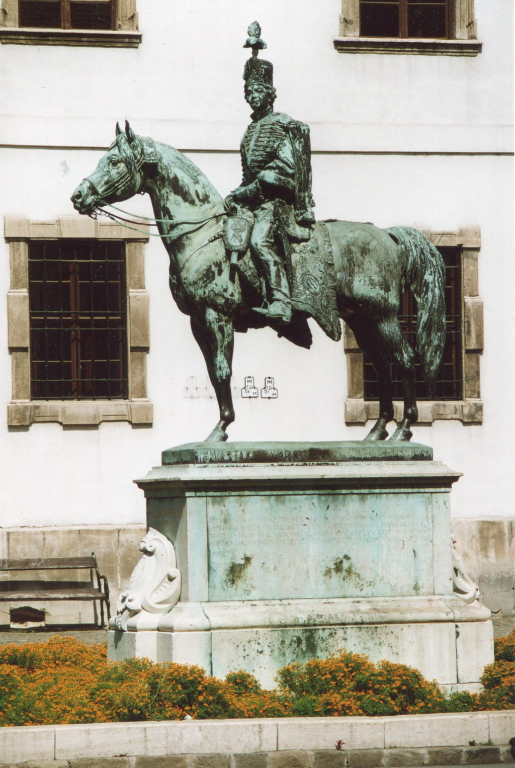 Ifj. Vastagh György: Hadik András lovas szobra, 1937, Budai Vár, Úri utca